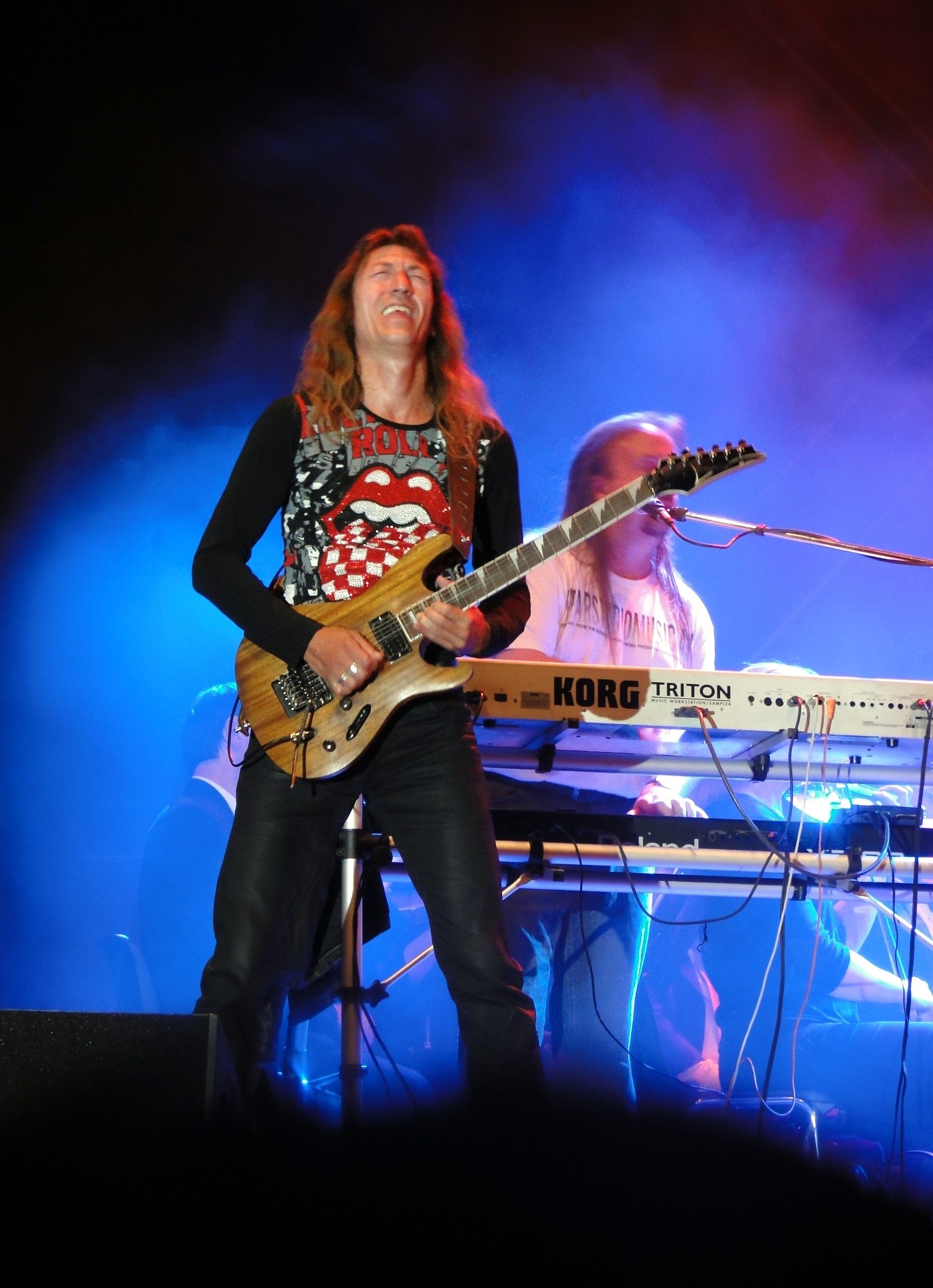 Eckhard Lipske von der Band electra während eines Konzerts im August 2009; im Hintergrund Keyboarder Andreas Leuschner